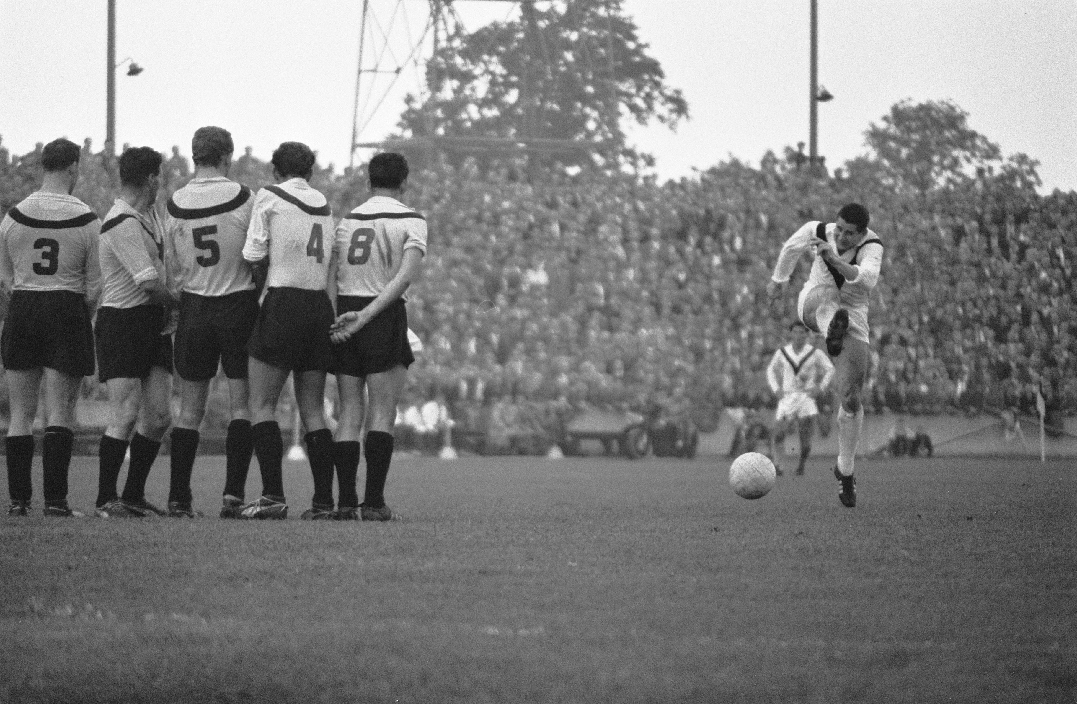 Collectie / Archief : Fotocollectie Anefo Reportage / Serie : [ onbekend ] Beschrijving : SC Enschede tegen DOS 3-2. de spelers van DOS vormen een muurtje voor het schot van Helmuth Rahn Datum : 21 augustus 1960 Locatie : Enschede Trefwoorden : sport, voetbal Persoonsnaam : Rahn, Helmuth Instellingsnaam : DOS, SC Enschede Fotograaf : Rossem, Wim van / Anefo Auteursrechthebbende : Nationaal Archief Materiaalsoort : Negatief (zwart/wit) Nummer archiefinventaris : bekijk toegang 2.24.01.05 Bestanddeelnummer : 911-5203